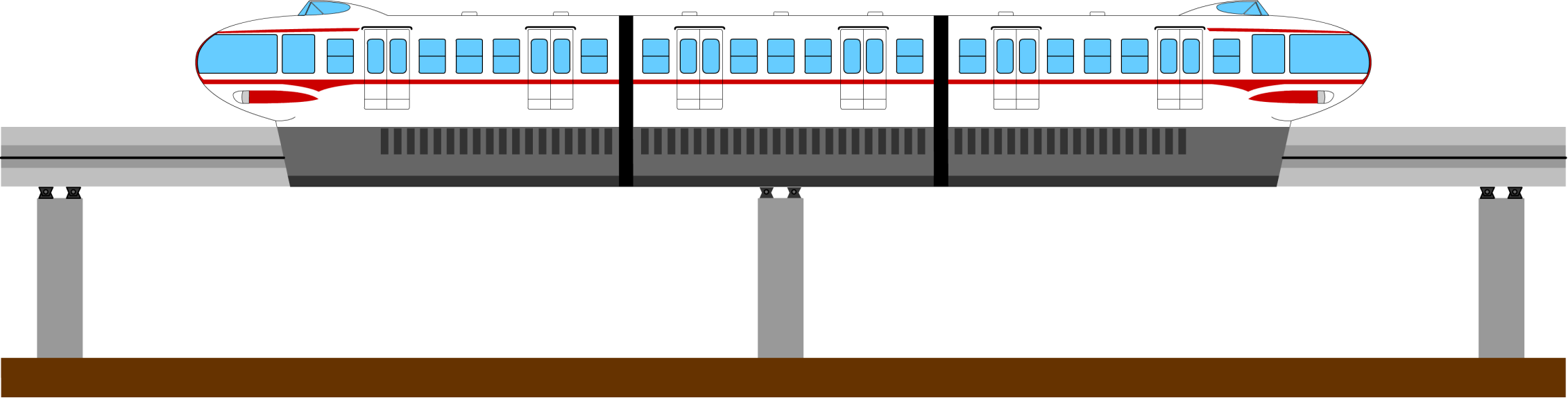 Disegno del profilo della Monorotaia ALWEG utilizzata a Torino durante la celebrazione del centenario dell'unità d'Italia